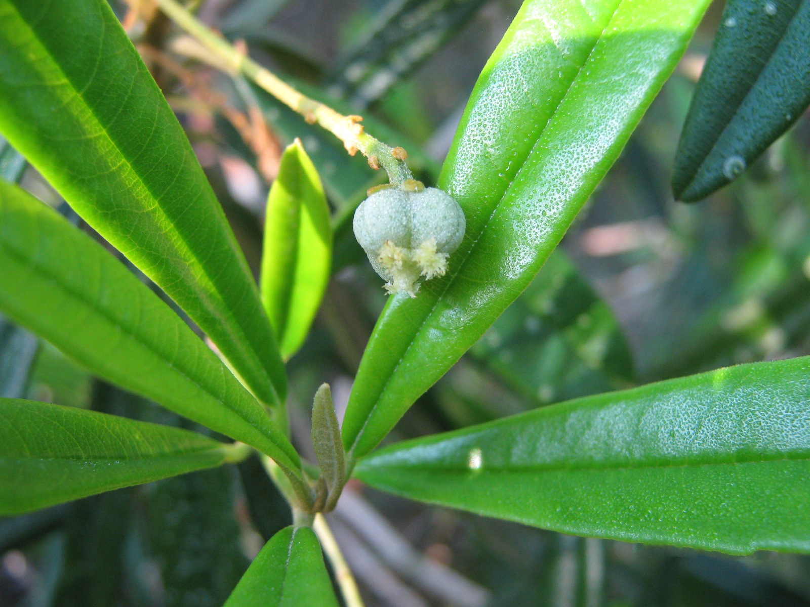 Foto de hojas y fruto de Leucocroton havanensis Borhidi